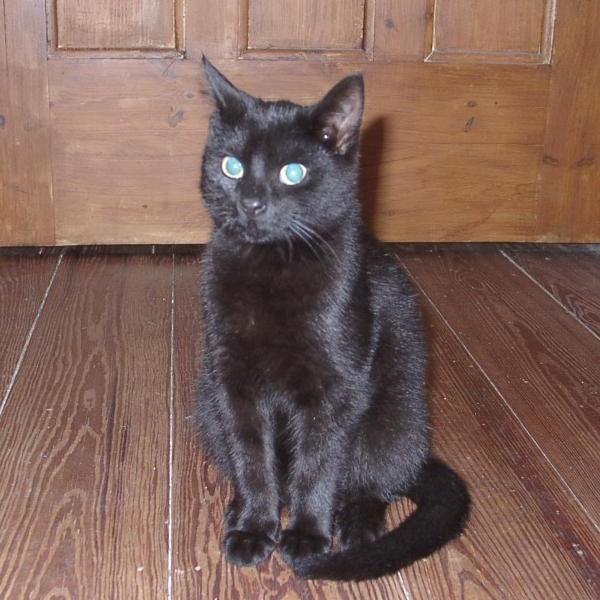 schwarze Hauskatze ca. 3 Monate alt